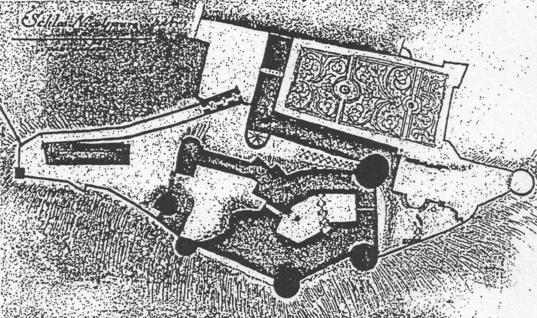 Plánek Mikulovského zámku z počátku 18. století. Vpravo nahoře královská zahrada obdélníkového půdorysu, na samotné mapce zámku je patrný komplex zámeckých budov s nádvořím (rozděleném spojovací chodbou) a přednádvořím. Obě nádvoří spojuje skalní průchod. Ze sbírky F. F. von Nicolai, Stuttgart.